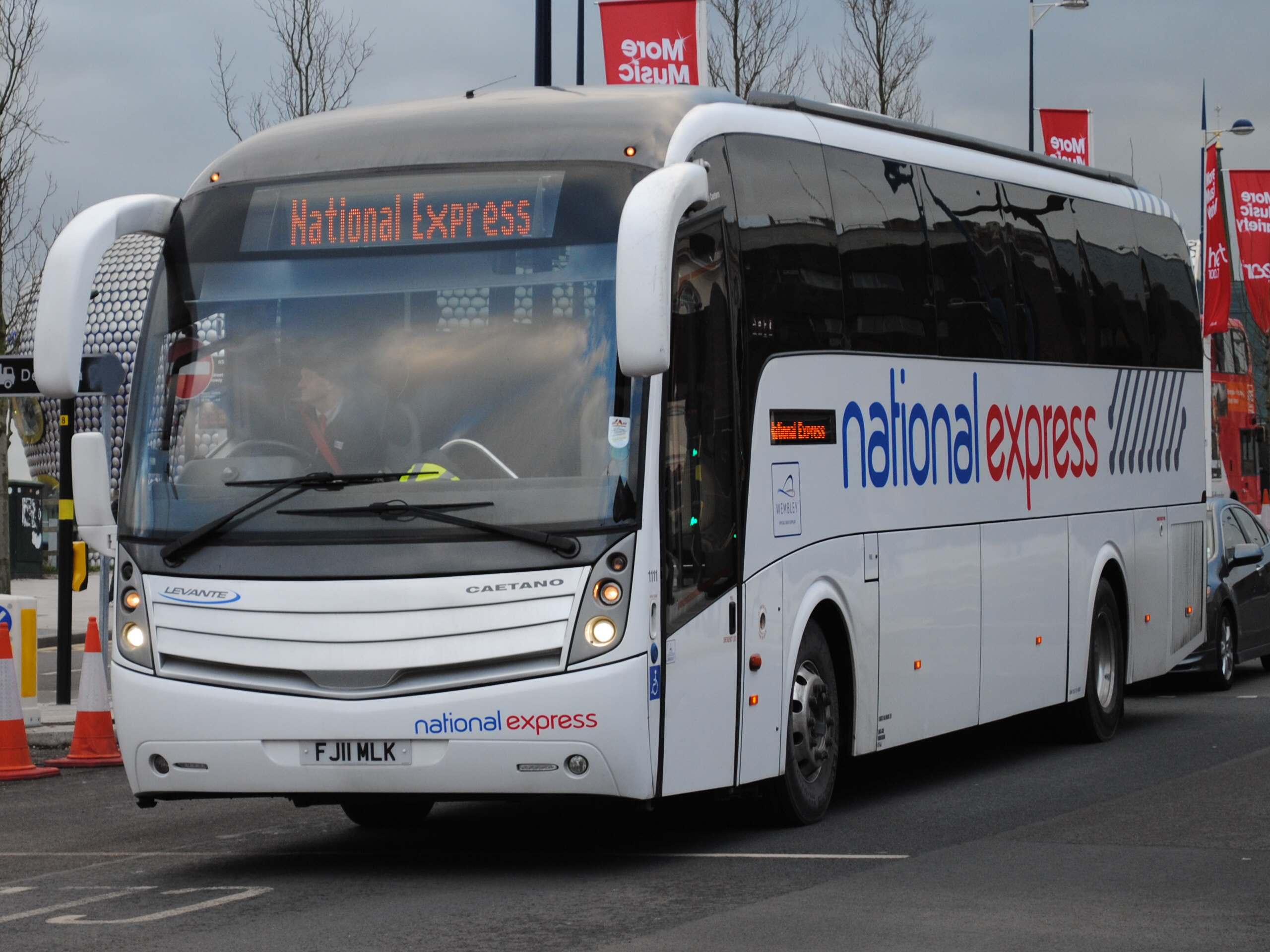 Volvo B9R Caetano Levante. seen here in Birmingham City Centre